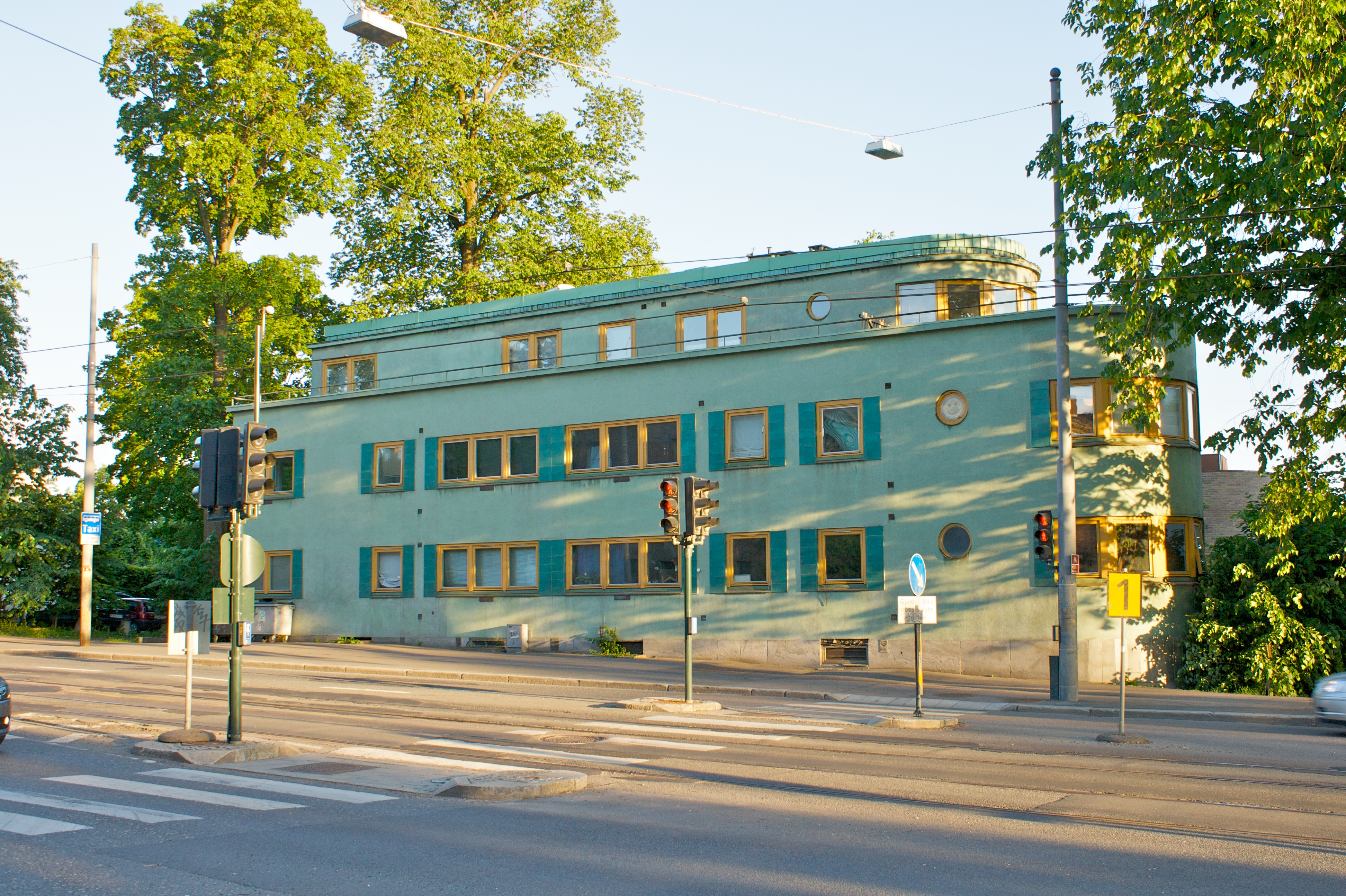 Drammensveien 112 på Frogner i Oslo.